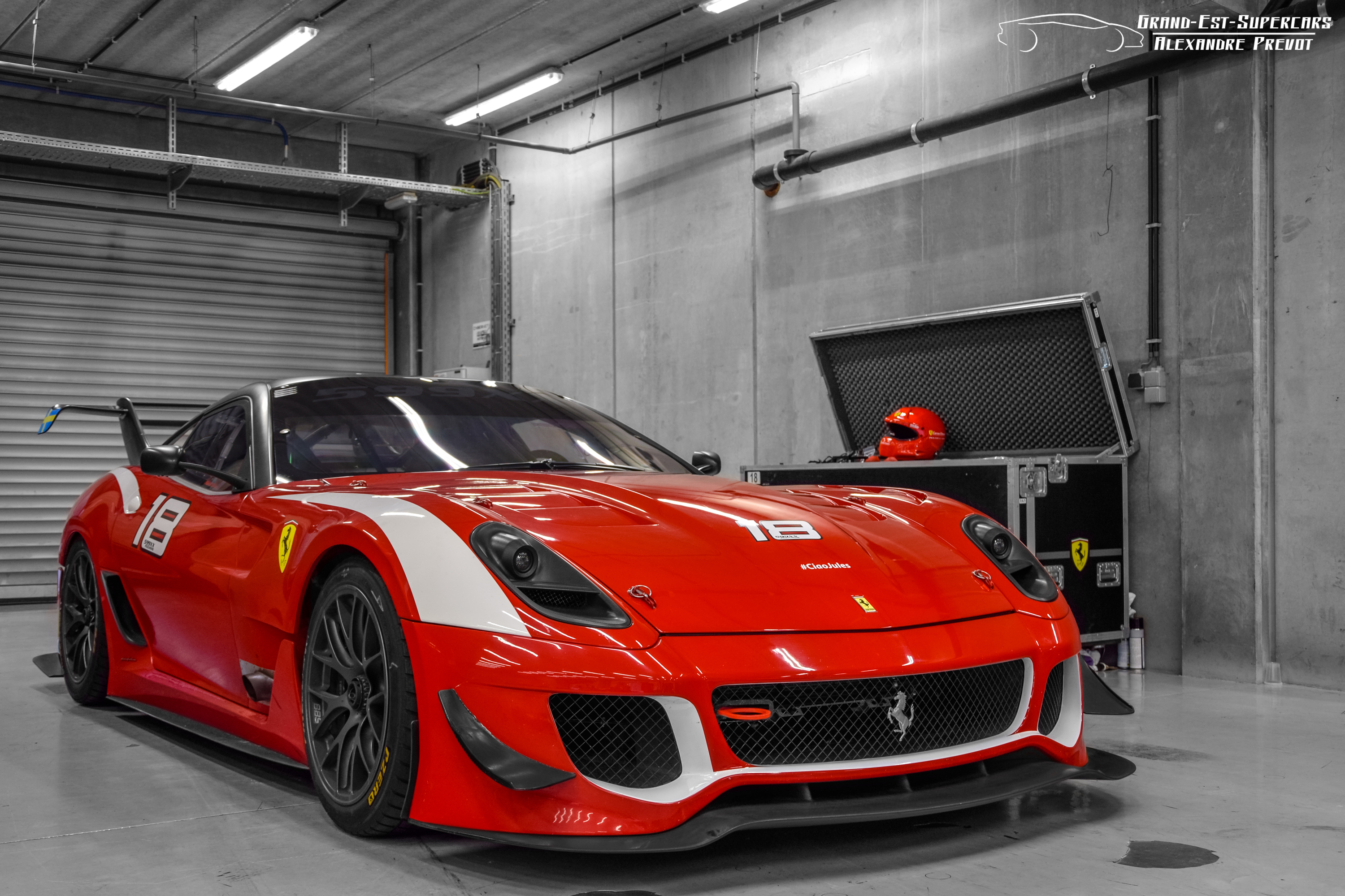 S/N : ZFF69PXX000170897 Numéro actuel : #18 Pilote : Alexander West (Suède)